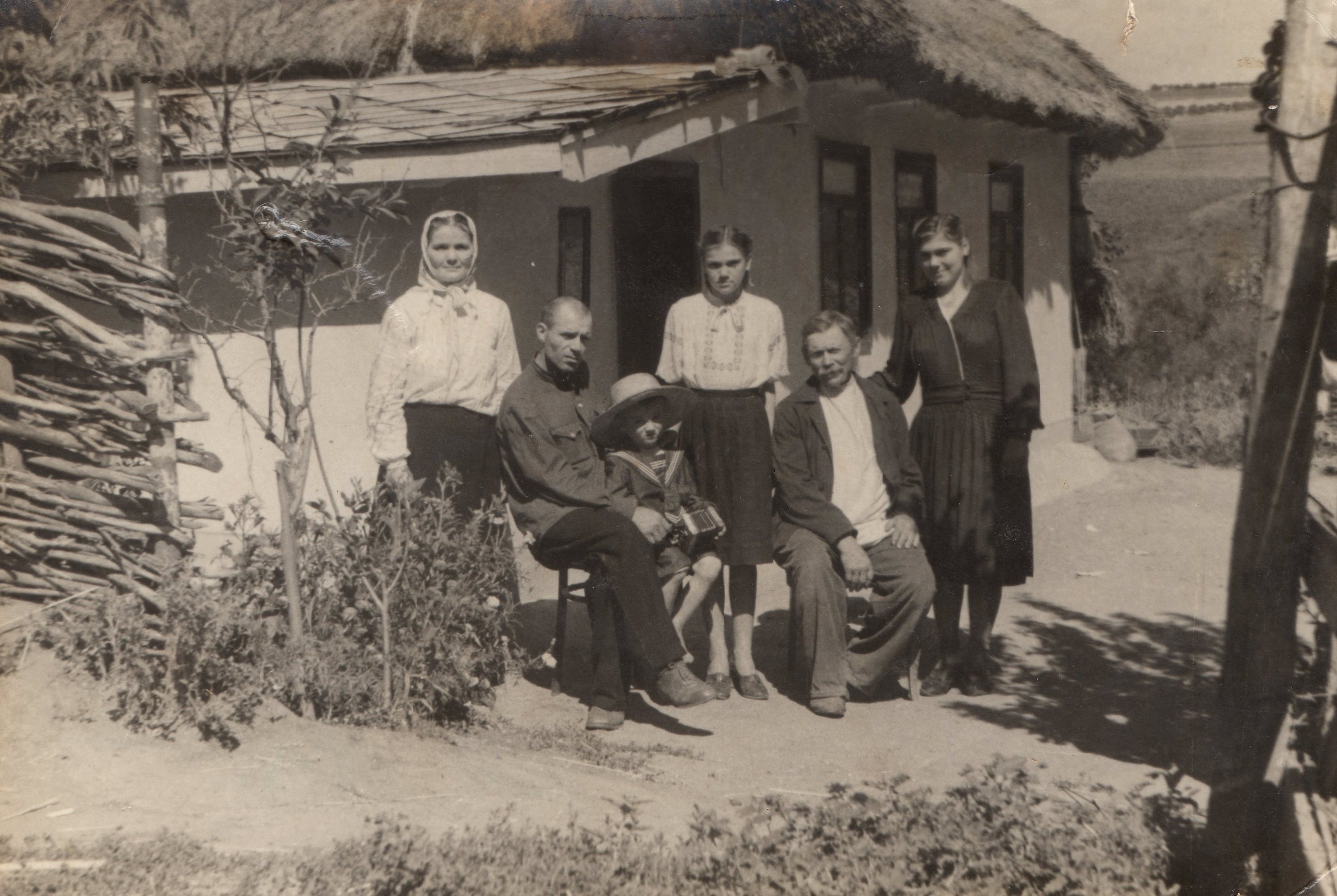 Блажевський Євген біля рідної оселі в селі Любомирка Подільського (Котовського) району Одеської області